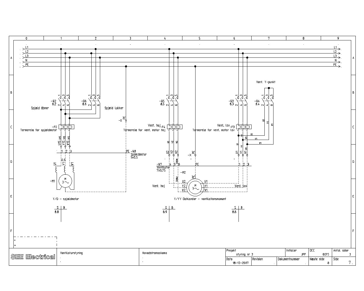 Hovedstrømsskema for styring af dahlandermotor med ventilationsmoment. Motor 1 er en spjæld-motor.